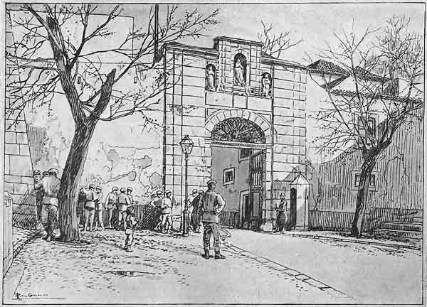 Esta imagem (em domínio público por morte do autor há mais de 75 anos) faz parte de um conjunto de 100 aguarelas e gravuras criadas em 1910-1920 e publicadas no livro Lisboa Velha (Afonso Lopes Vieira (prefácio). Anuário Comercial: Lisboa, 1925).